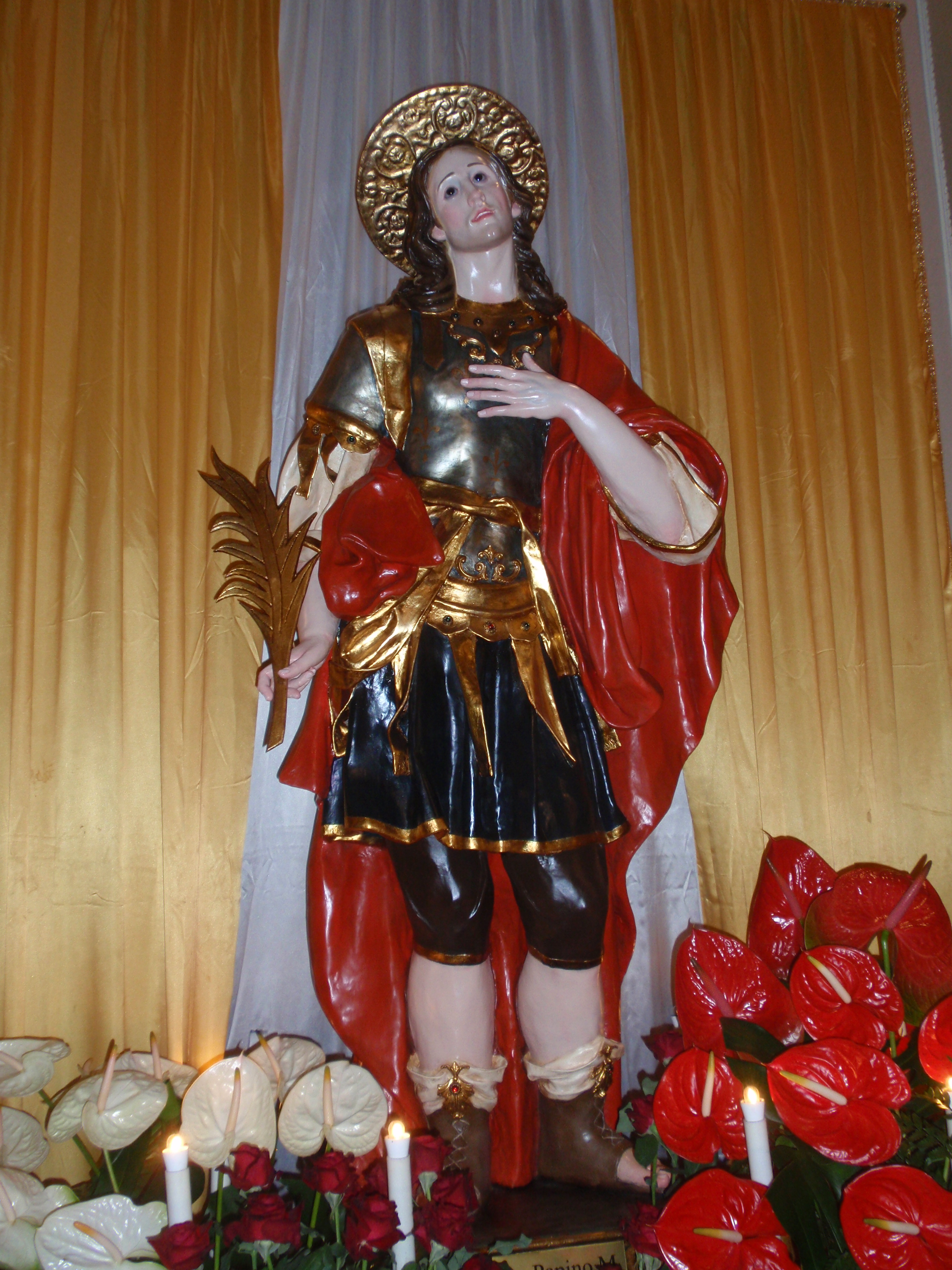 Simulacro in cartapesta di San Papino Martire Celeste Custode e Protettore della Città di Milazzo (Messina)